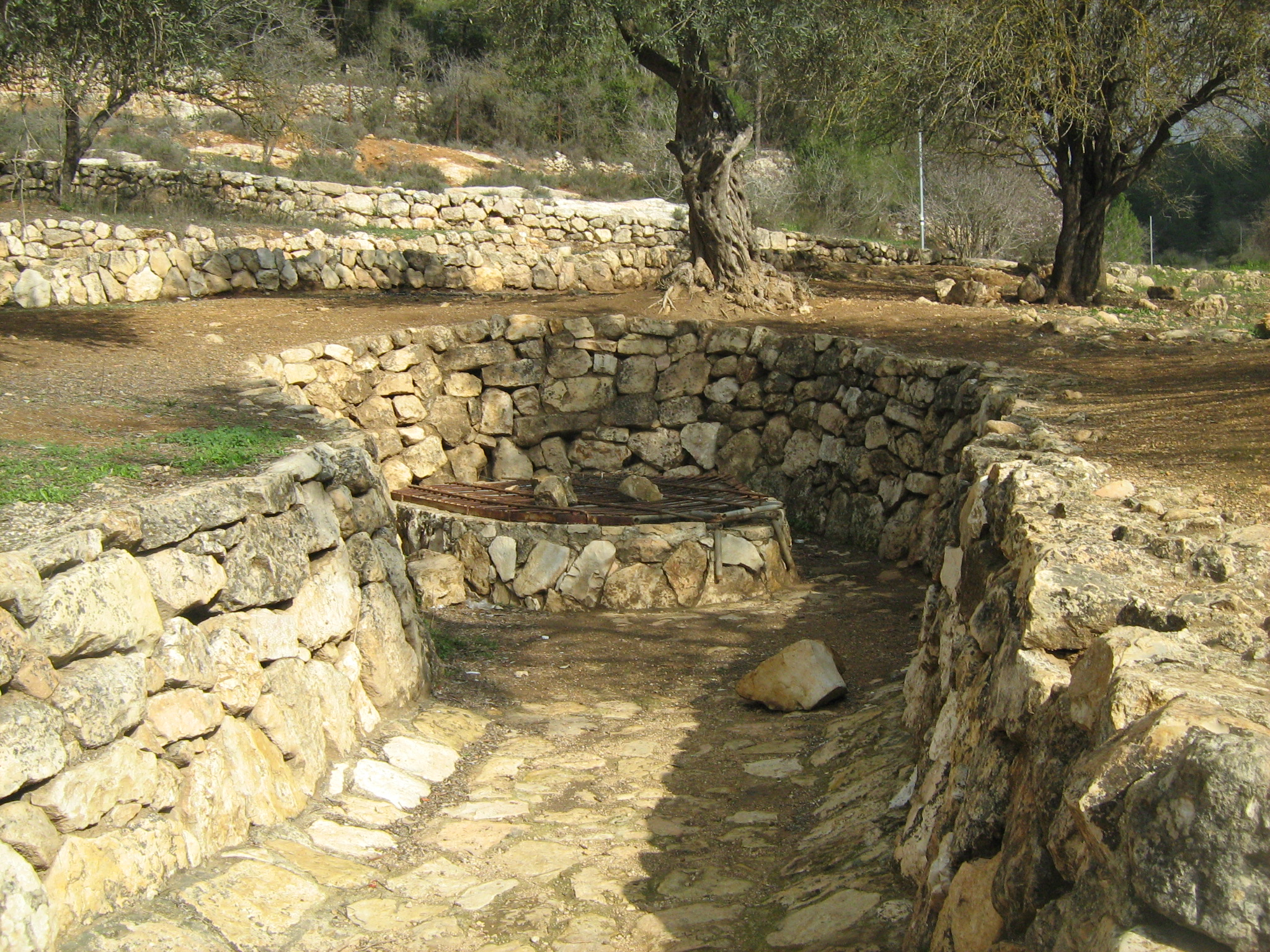 עין חנדק